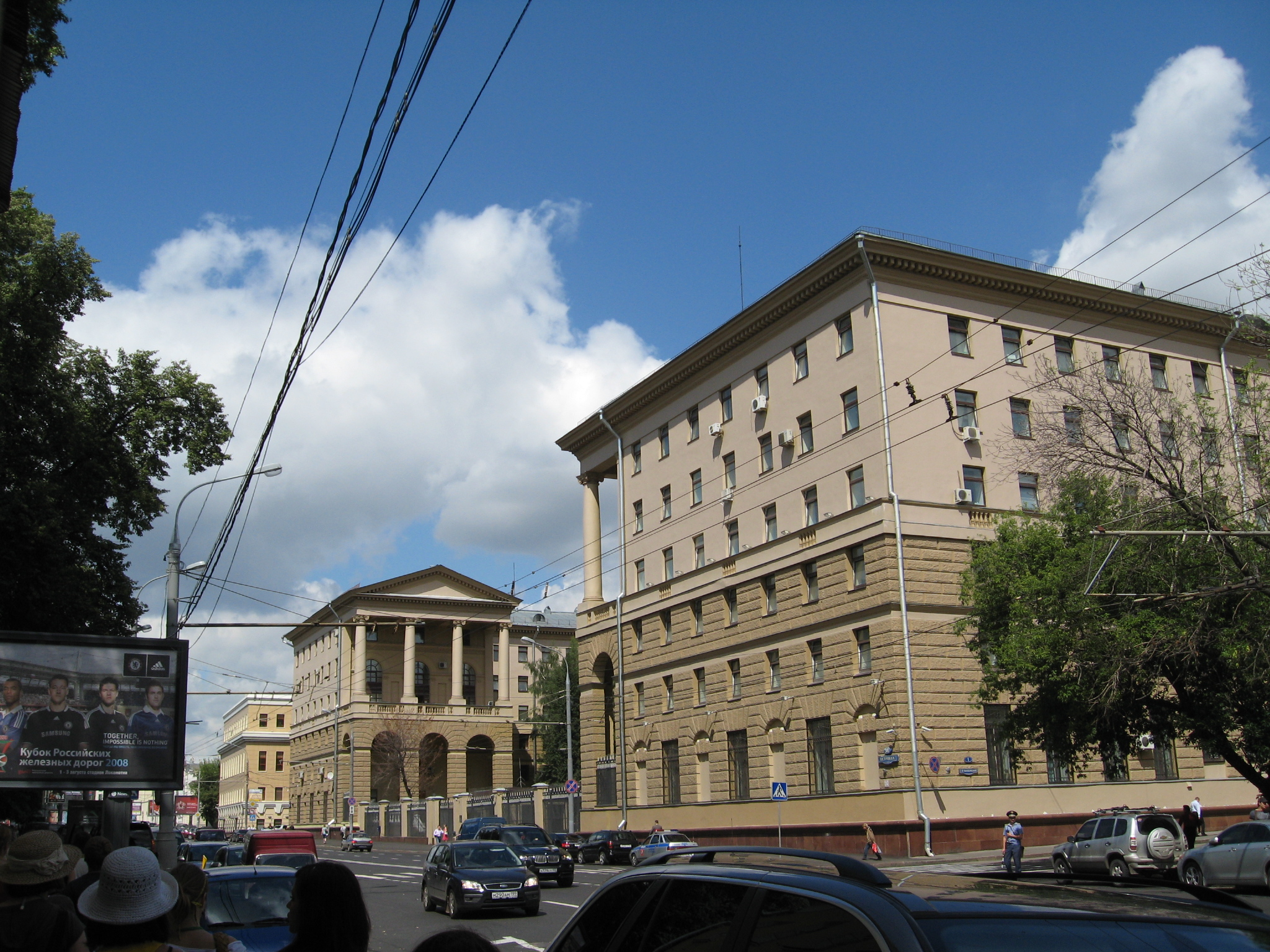 Петровка-38